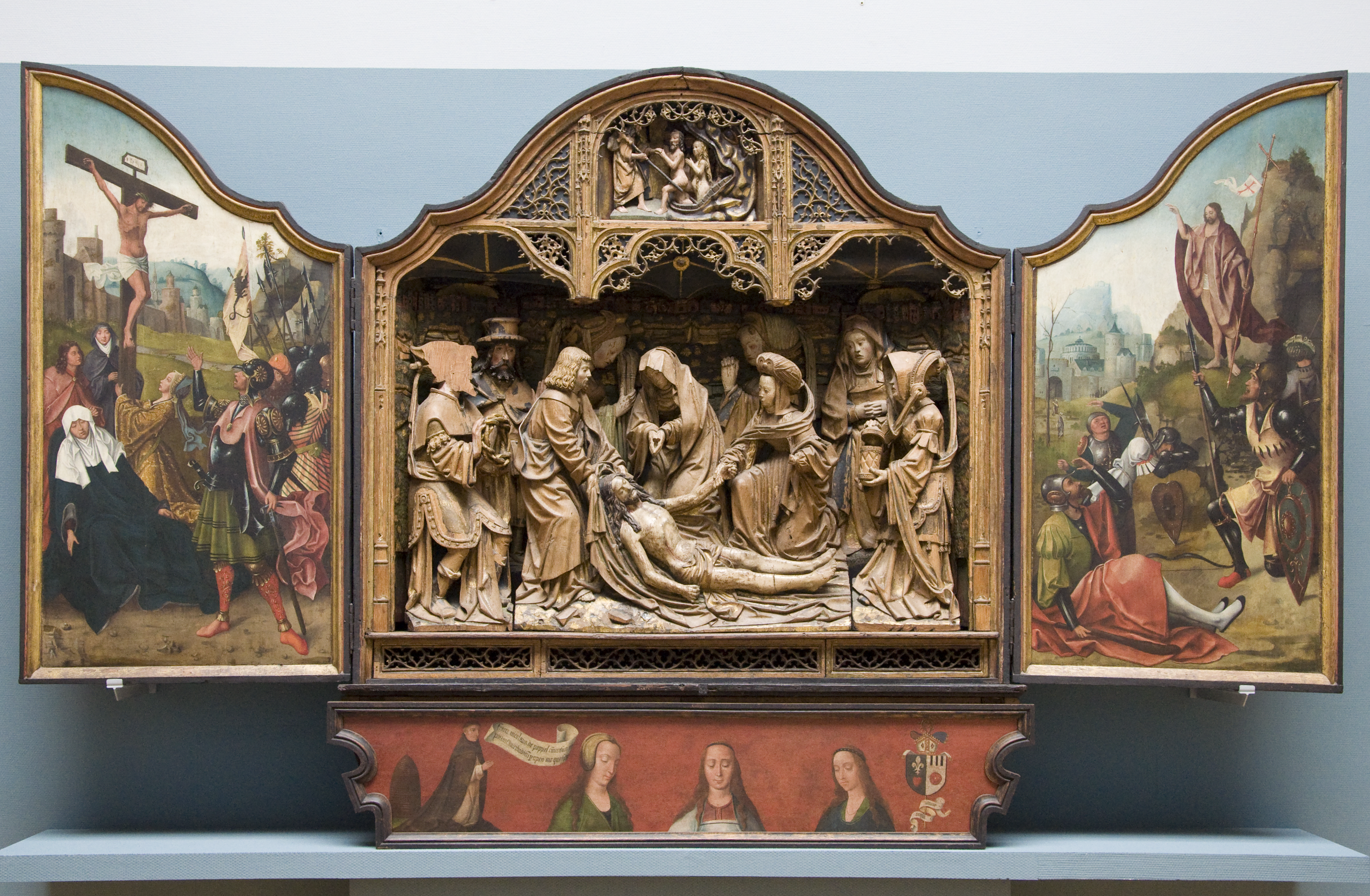 Passieretabel van Averbode (gemaakt voor de abdijkerk van Averbode) - Jacob van Cothem (uit Antwerpen) - eerste helft 16e eeuw - Collectie Vleeshuis Antwerpen - anno 2010 tentoongesteld in het Koninklijk museum voor Schone Kunsten te Antwerpen Royal Museum of Fine Arts Antwerp Native nameKoninklijk Museum voor Schone Kunsten AntwerpenLocationAntwerp, BelgiumCoordinates51° 12′ 30″ N, 4° 23′ 41″ E Established1810Website control ISNI: 0000 0004 0608 5287